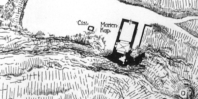 Lageplan der Marienkapelle